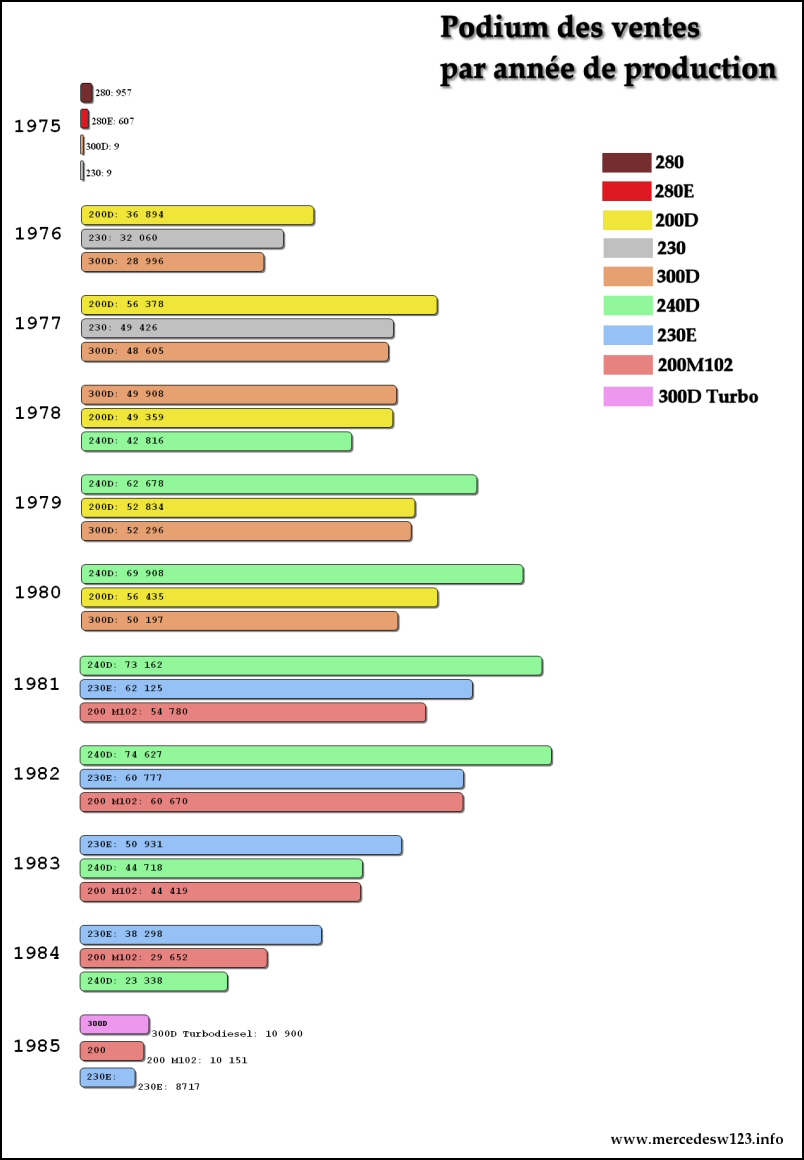 chiffre de production de la mercedes w123 par motorisation et par année de production